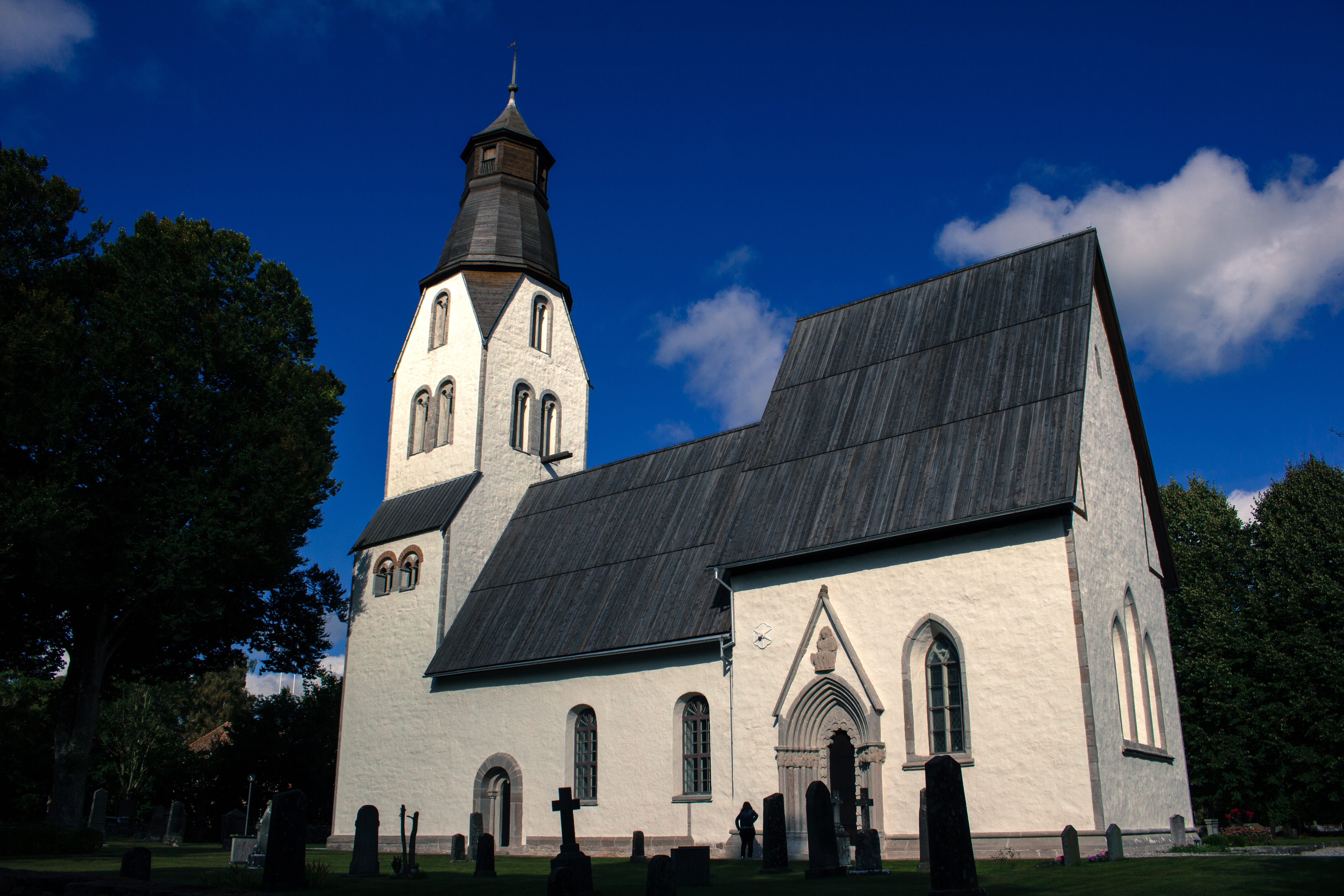 Igrexa de Lye, na illa sueca de Gotland.